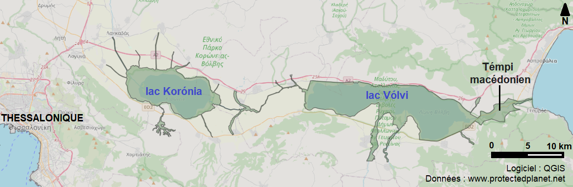 Emprise du parc national des lacs Korónia, Vólvi et du Témpi macédonien en vert et légende des principaux sous-espaces le composant. A l’ouest du parc s’étend l’agglomération de Thessalonique. UNEP-WCMC and IUCN (2020), Protected Planet: Ethniko Parko Ygrotopon Ton Limnon Koroneias - Volvis Kai Ton Makedonikon Tempon in Greece ; The World Database on Protected Areas (WDPA)/The Global Database on Protected Areas Management Effectiveness (GD-PAME) [On-line], Cambridge, UK. Data provided by the European Environment Agency (EEA). Available at: Basemap: OpenStreetMap. Free software: QGIS. Creation: Iolchos07.